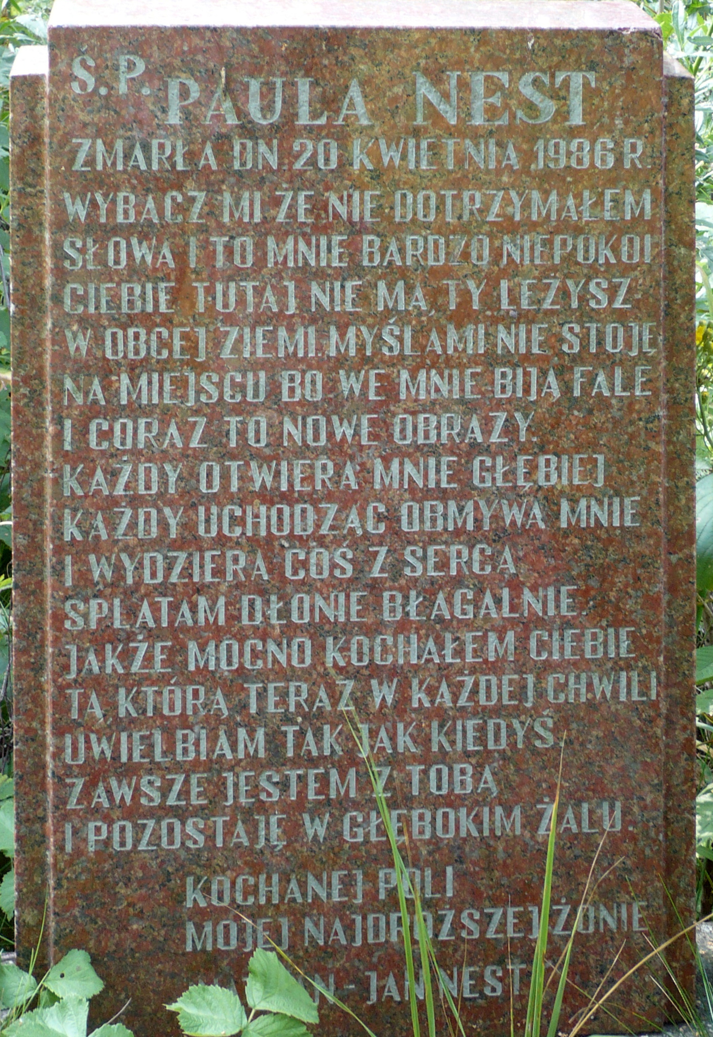 Współczesny nagrobek na cmentarzu żydowskim w Radomsku